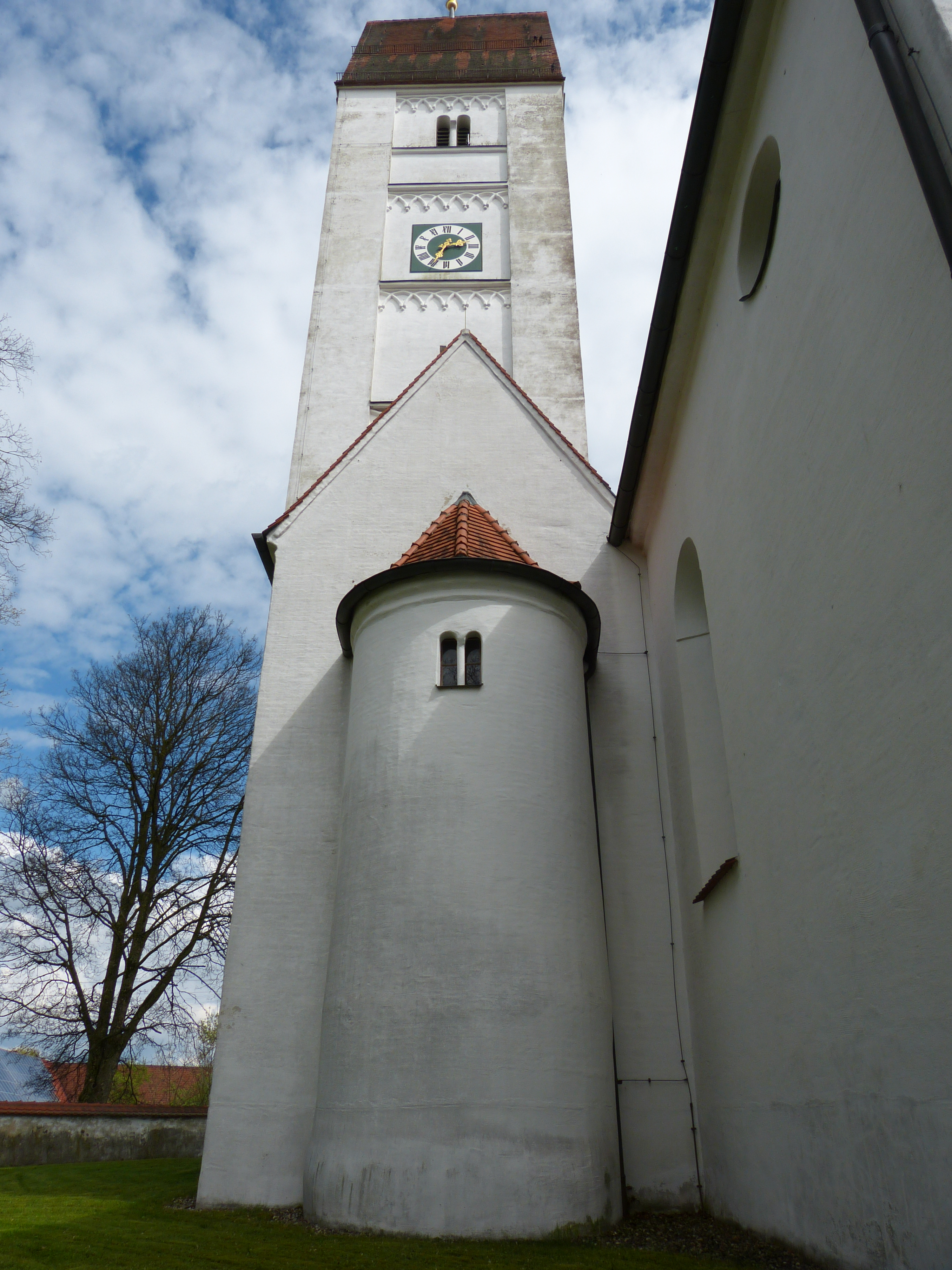 St. Michael, Eppishausen, Landkreis Unterallgäu, Bayern